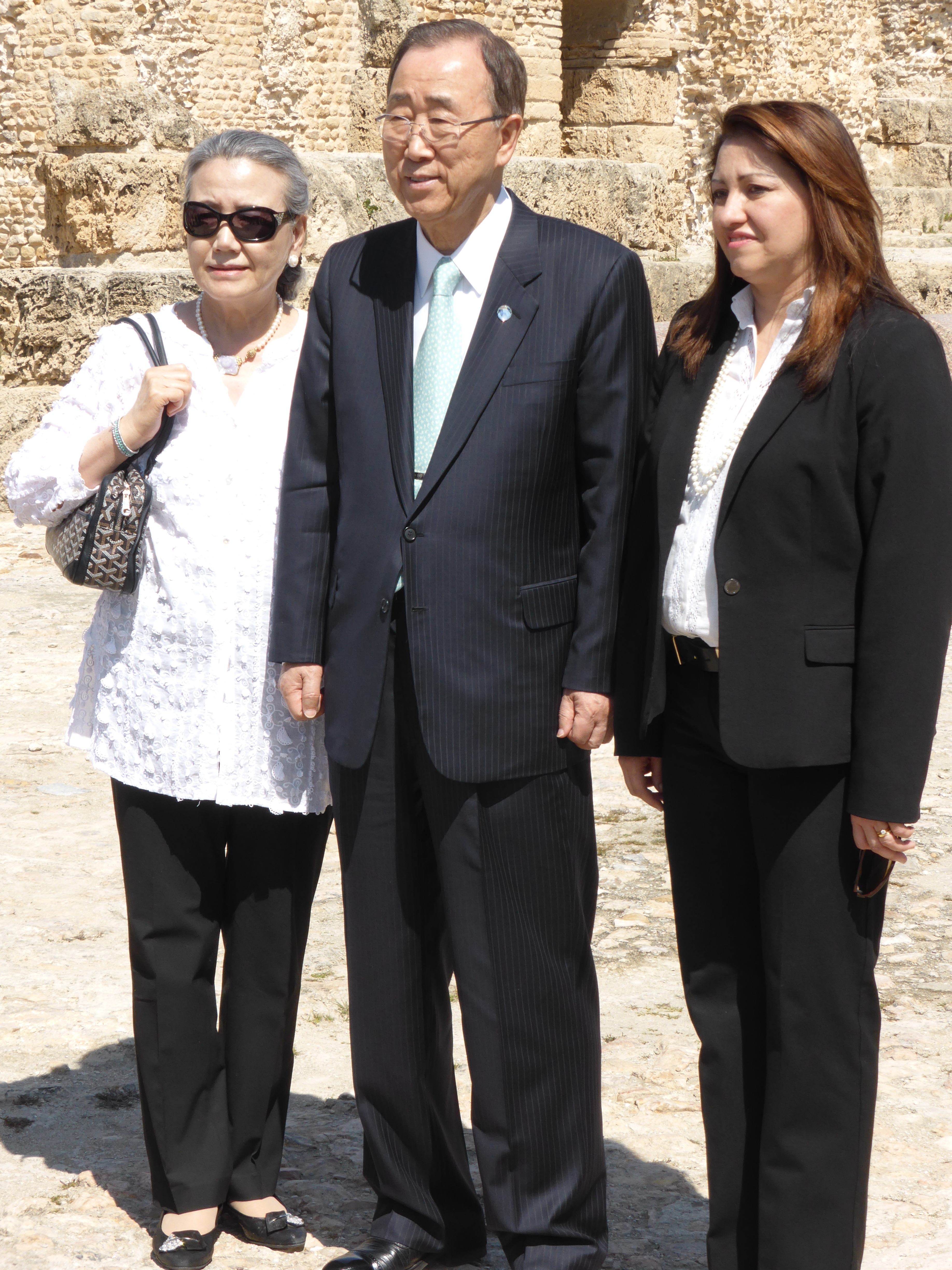 Le couple Ban Ki-moon avec Sonia M'Barek visitant les ruines de Carthage